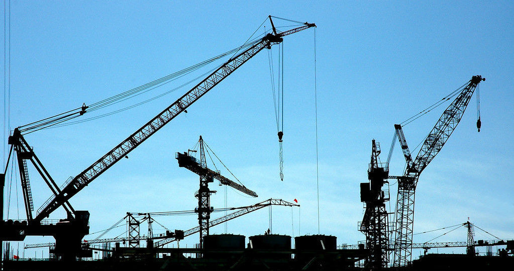 这是我自己的作品，授权维基百科使用。